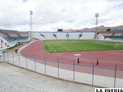 Estadio Boliviano Jesus Bermudez de Oruro